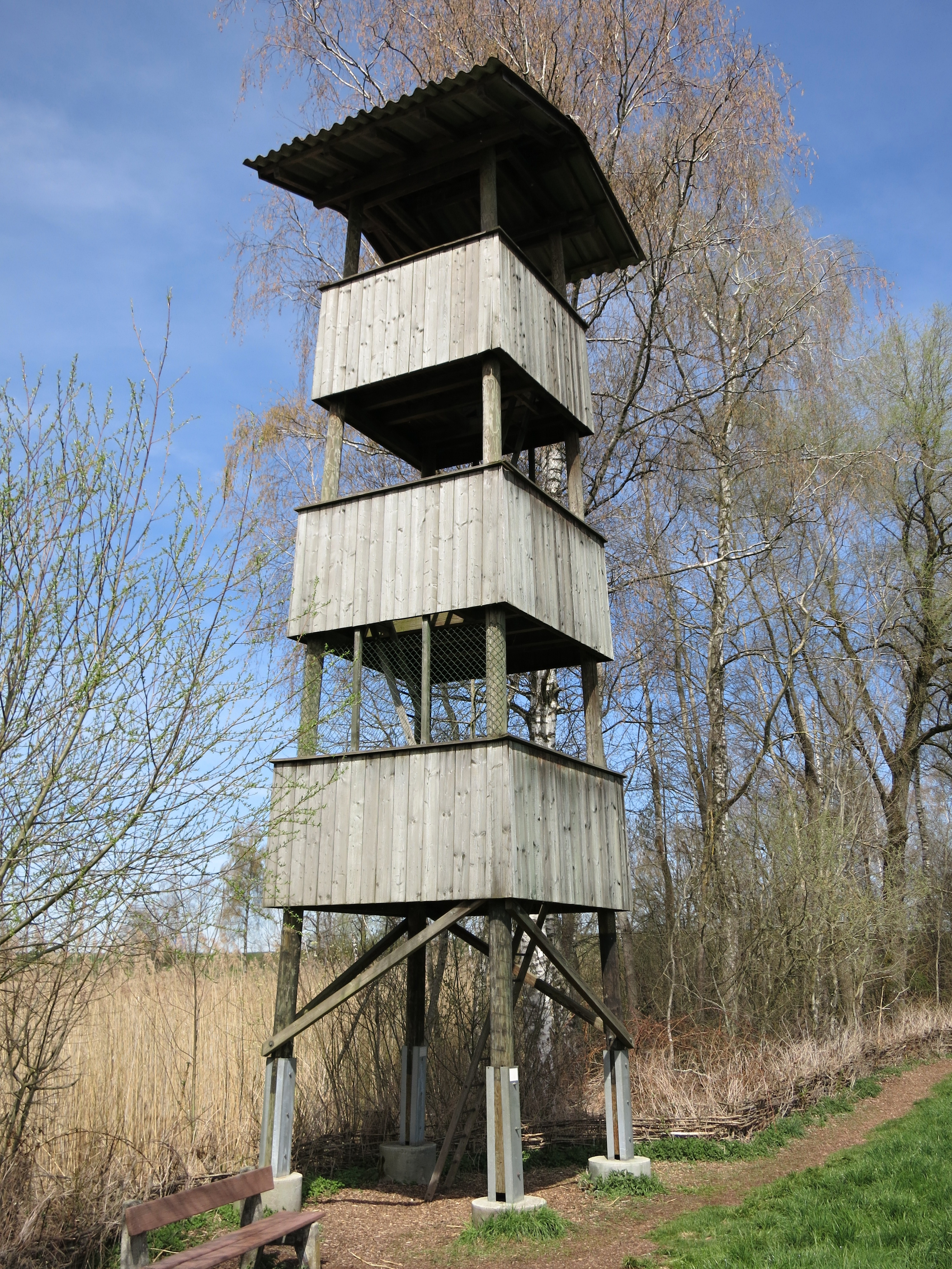 Möösliturm